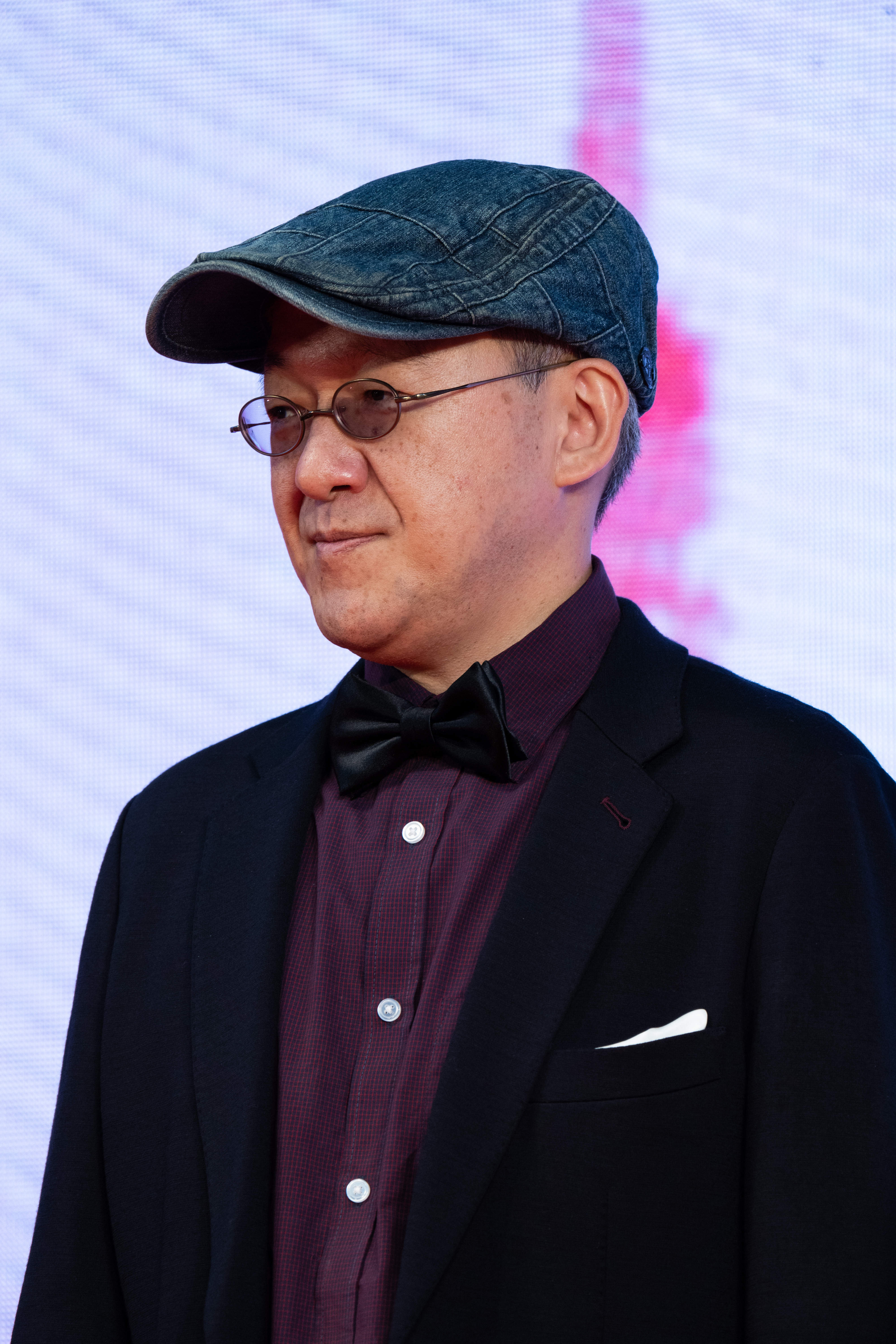 第32回 東京国際映画祭 オープニングセレモニー 小西賢一 (ジャパニーズ・アニメーション「THE EVOLUTION OF JAPANESE ANIMATION/VFX」)